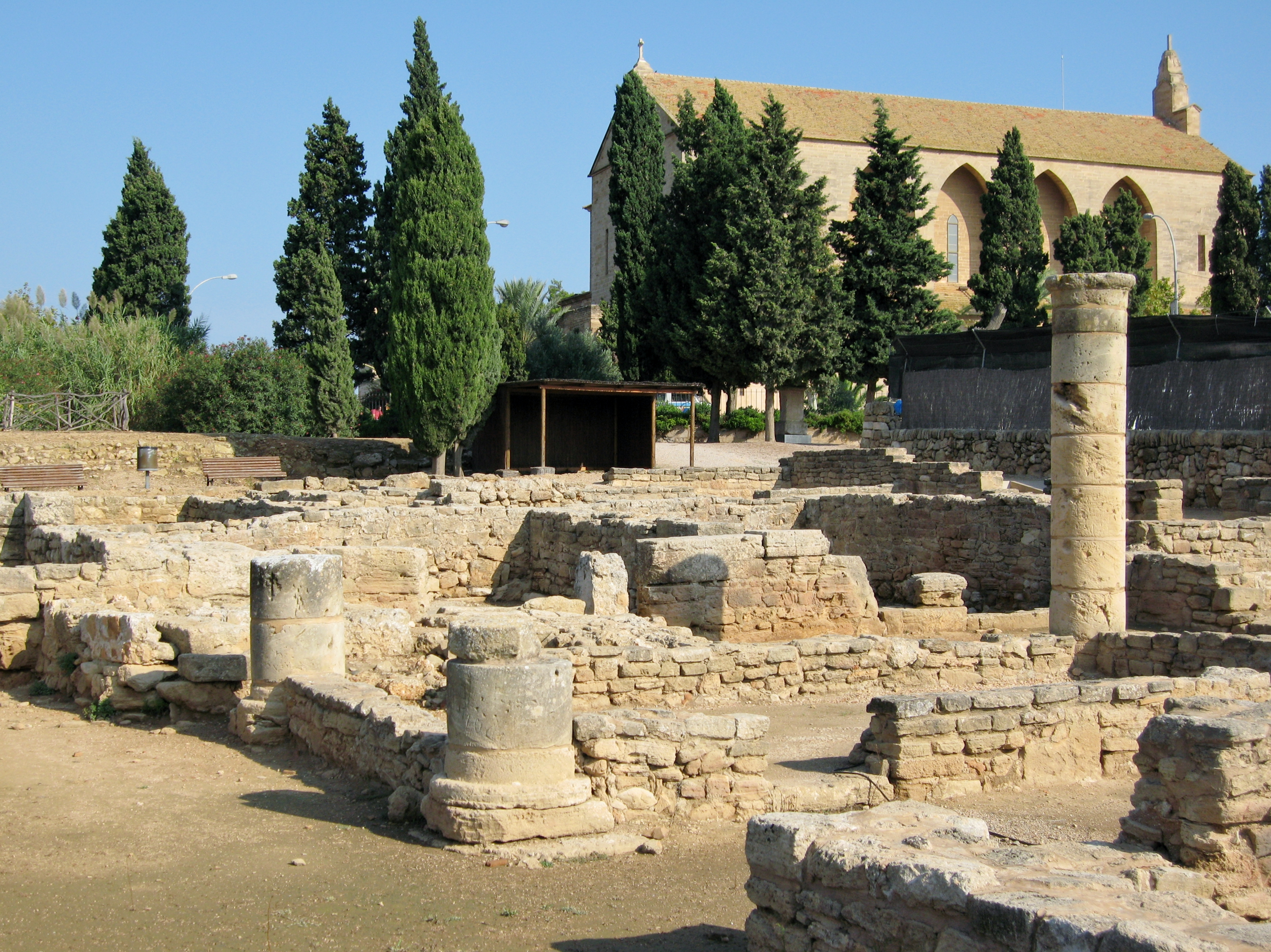 Ruinen der antiken Stadt Pollentia (katalanisch: Poŀlèntia), Gemeinde Alcúdia, Mallorca, Spanien